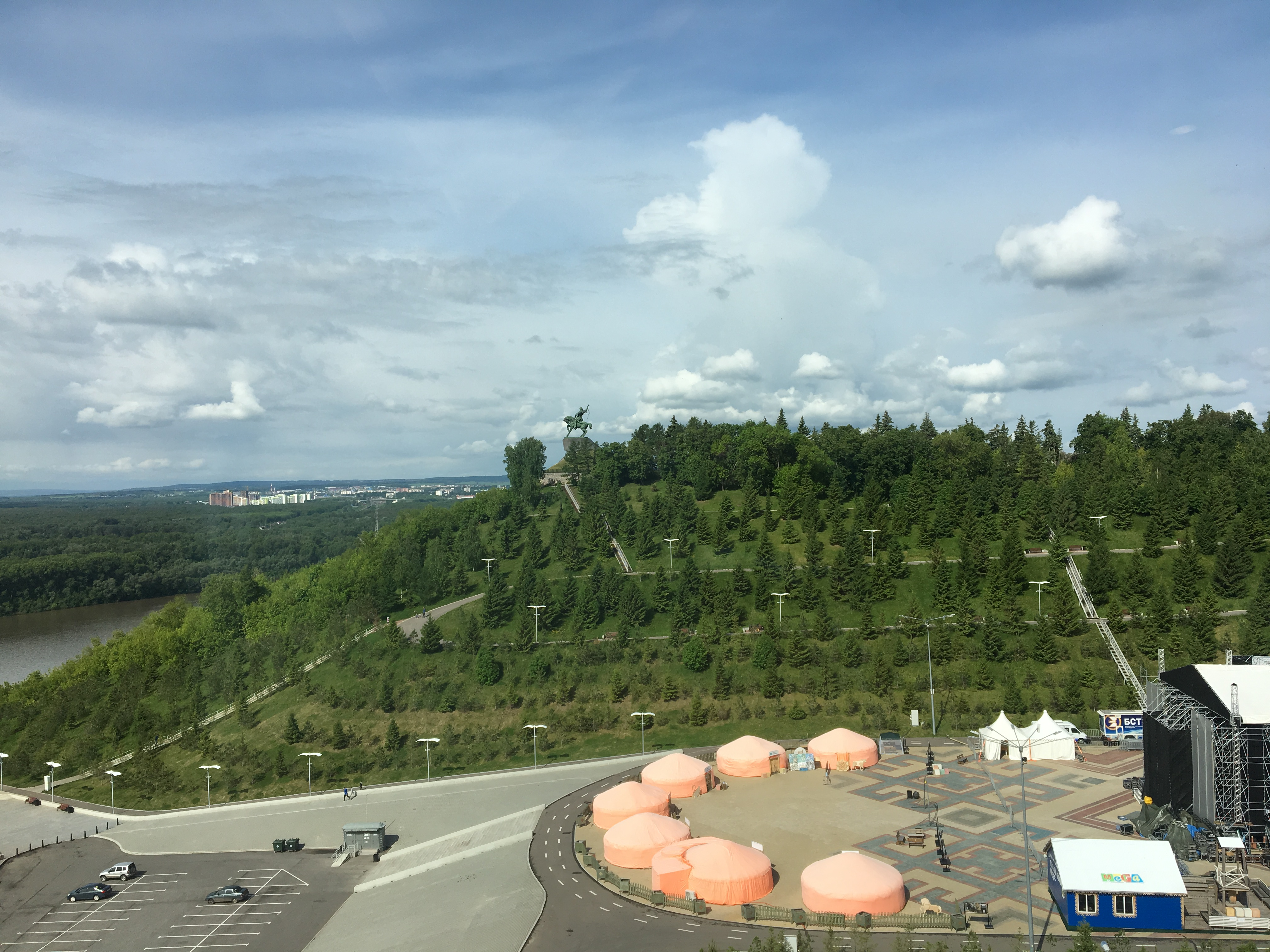 Фестиваль в г. Уфа